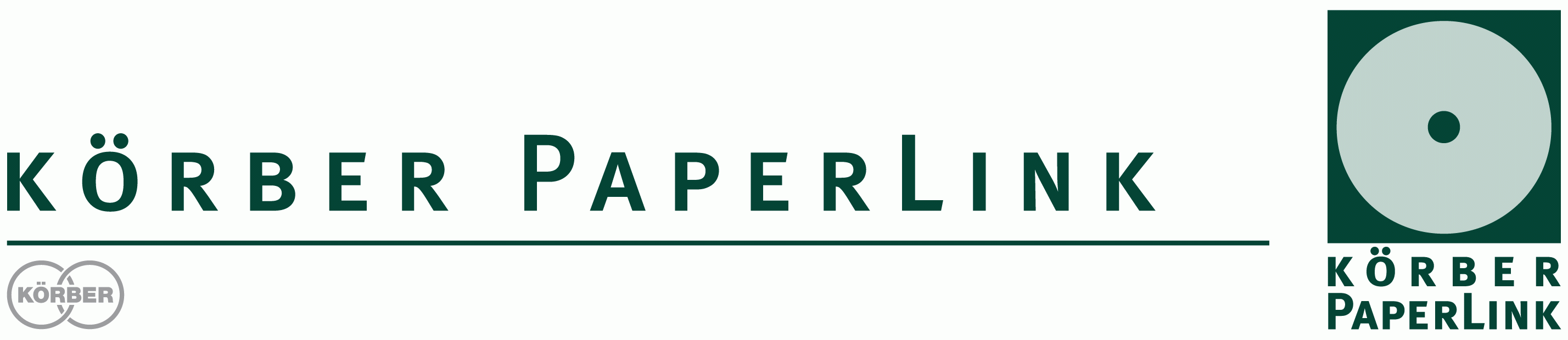 Logo KPL